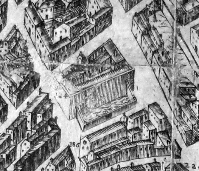 Pianta del buonsignori, dettaglio 184 stinche